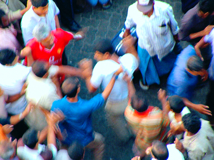 Selbstjustiz auf einer Straße in Malé, Malediven